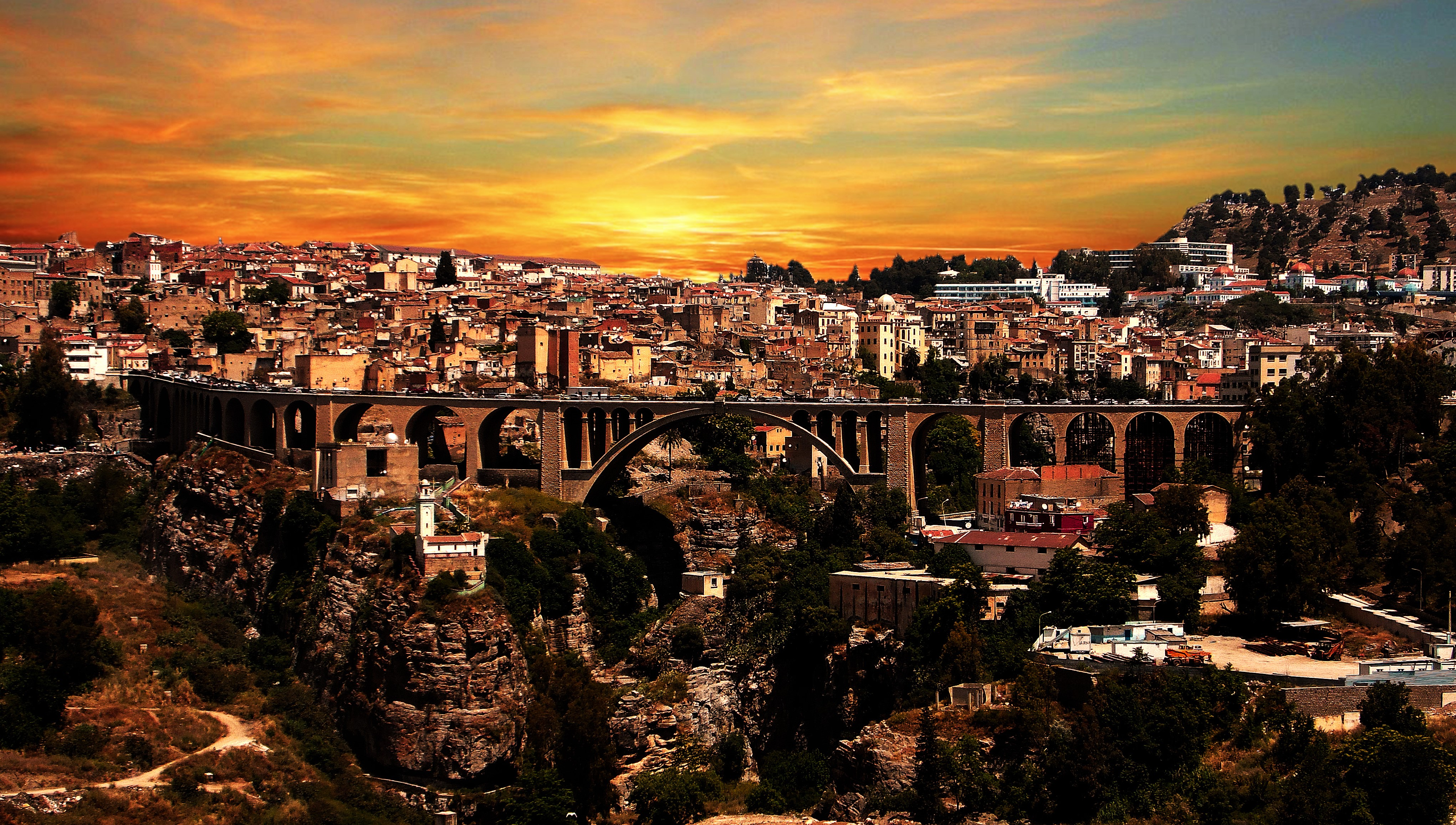 La vieille ville de Constantine, une cité trois fois millénaire qui a vu le passage de nombreuses civilisations, depuis les phéniciens, numides, romains, vandales, byzantins, arabes, ottomans et français. Nous voyons en premier plan le pont Sidi Rached, frère jumeau du pont Adolphe au Luxembourg, le pont de Sidi-Rached a été inauguré le 19 avril 1912, il serait durant cette période le plus haut pont en pierre du monde.